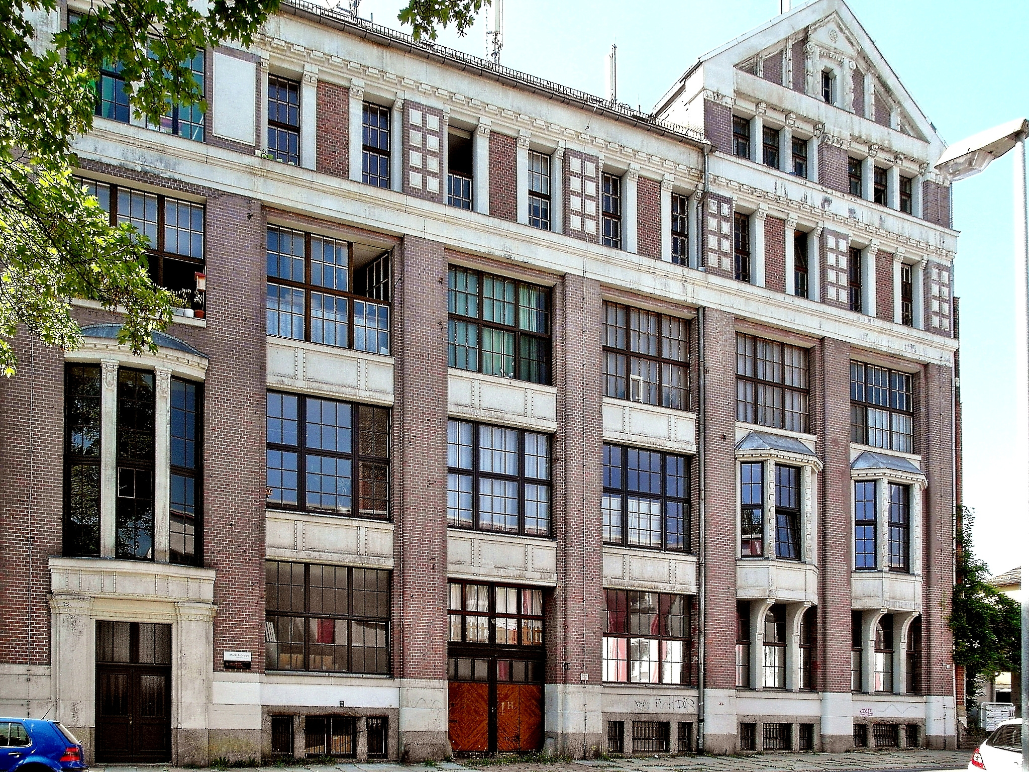 Antigua fábrica de la empresa E. O. Richter en Chemnitz (Alemania)